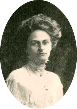 Portreto de Ivy Kellerman Reed